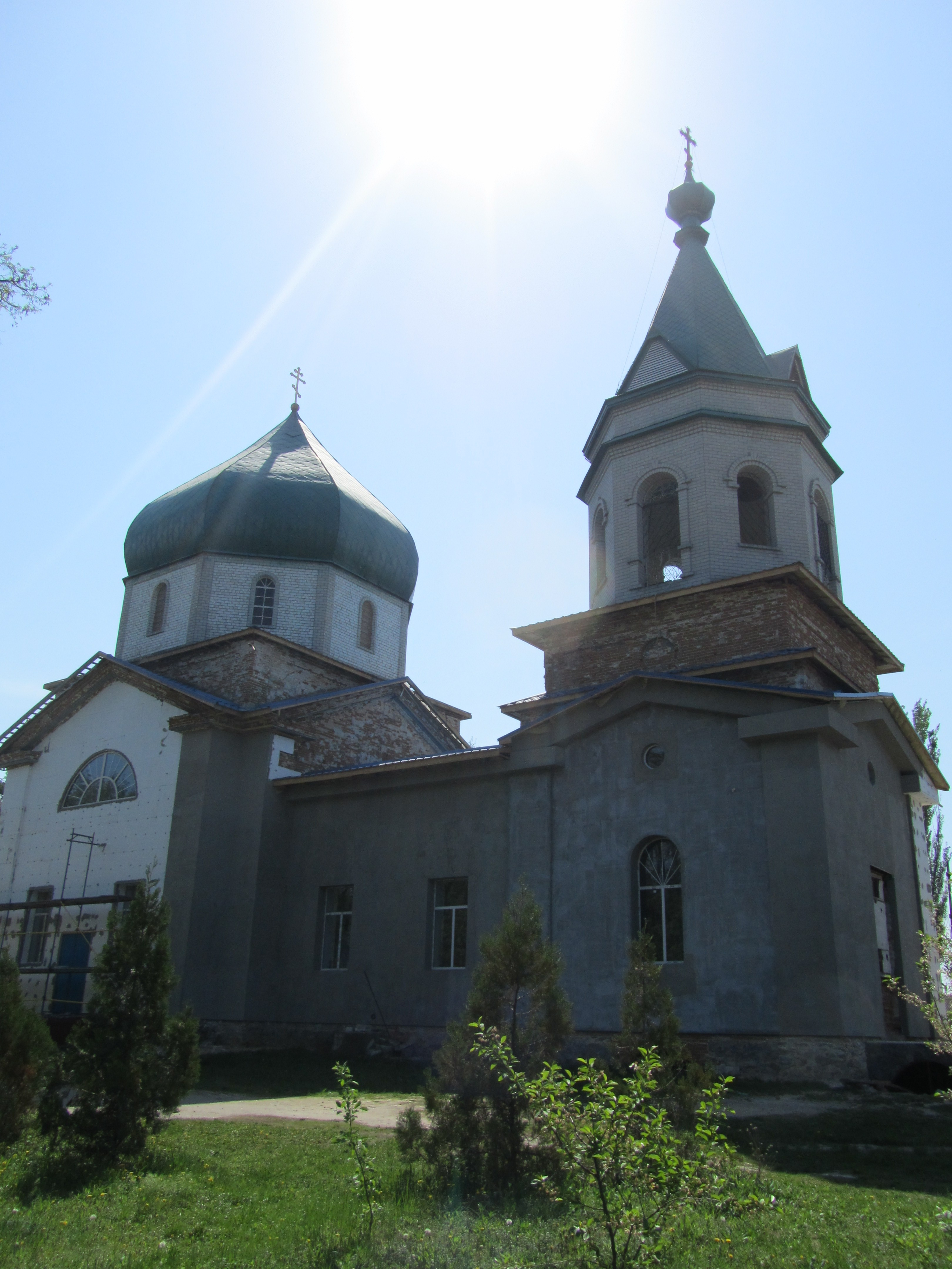 Церква Успіння Божої Матері, Кременчук, Вул. Макаренка, 107